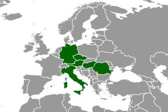 Penny Market v roce 2018